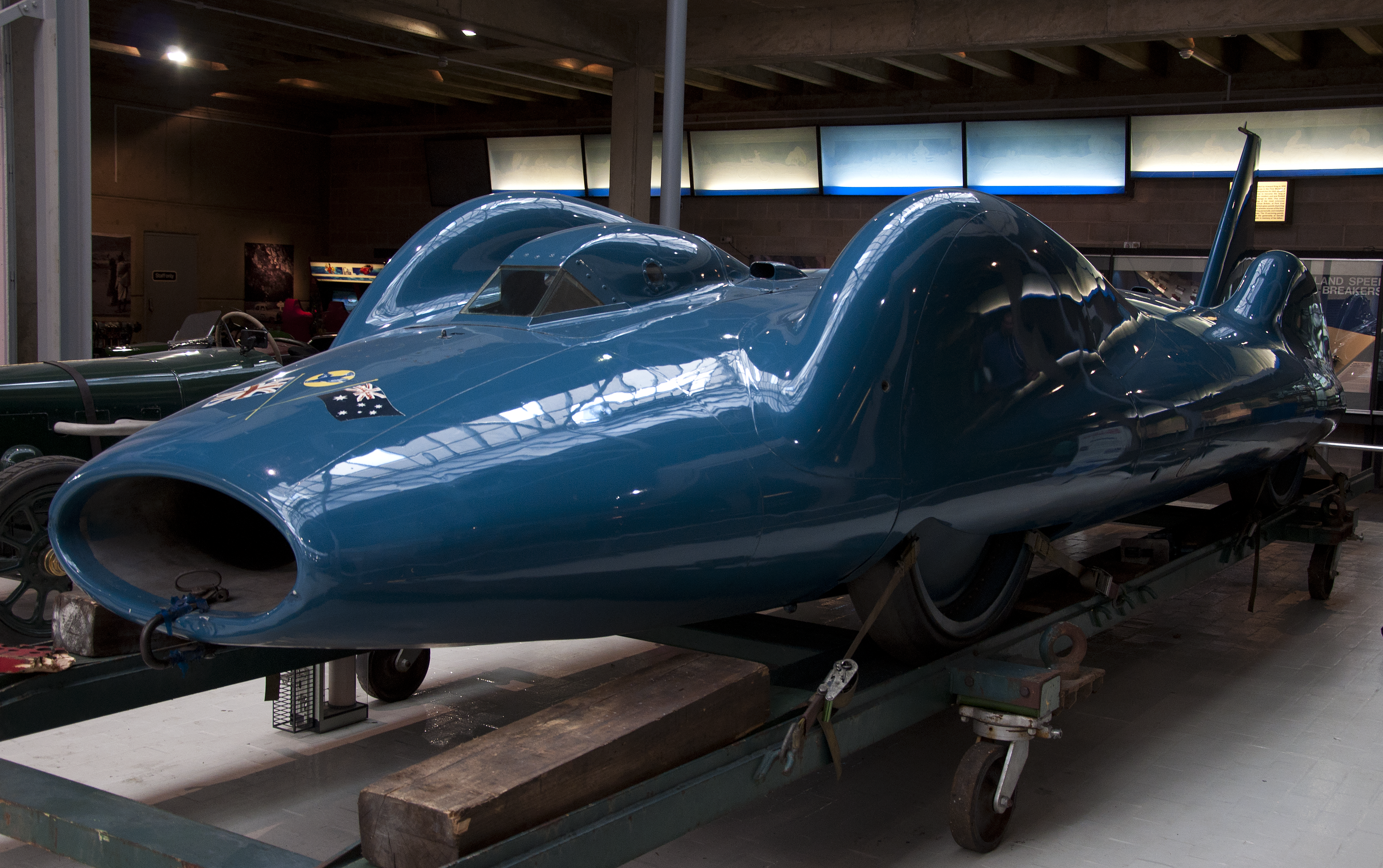 De Bleubird Proteus CN7 van Donald Campbell in het National Motor Museum, Beaulieu, Engeland